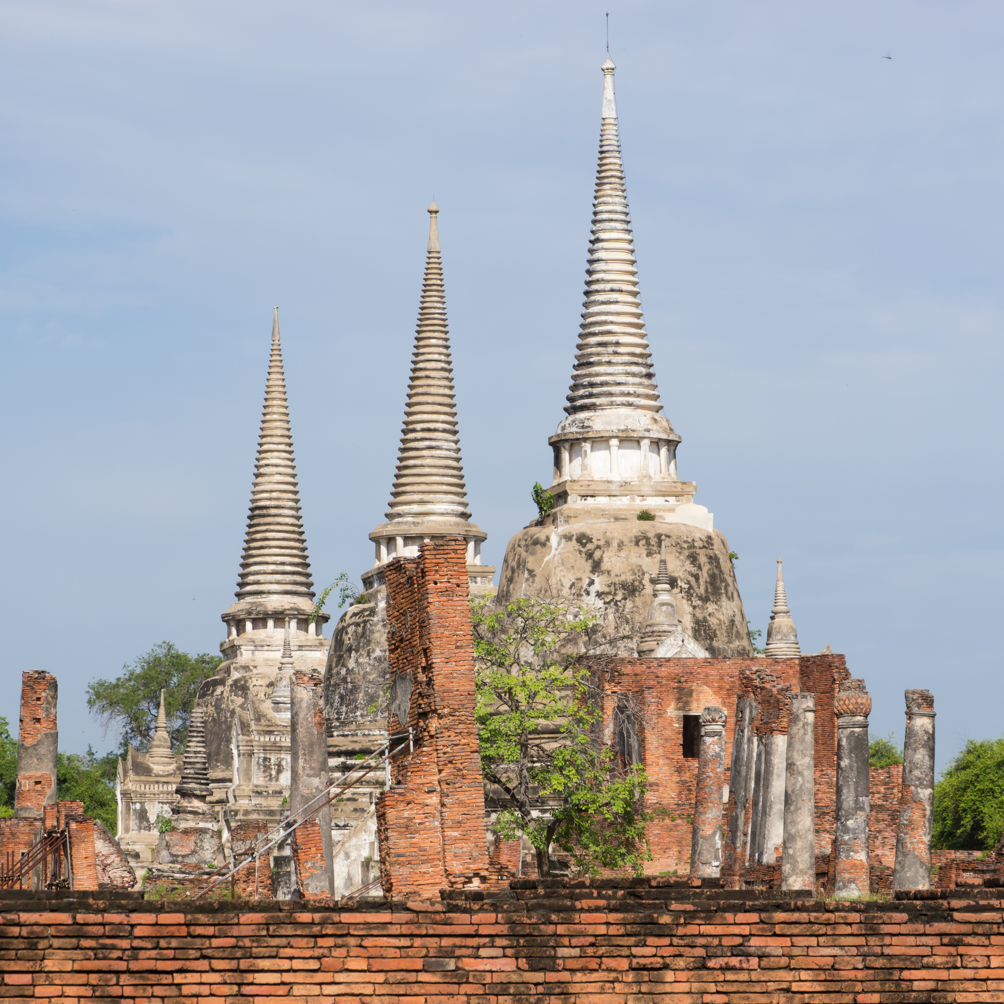 วัดพระศรีสรรเพชญ์